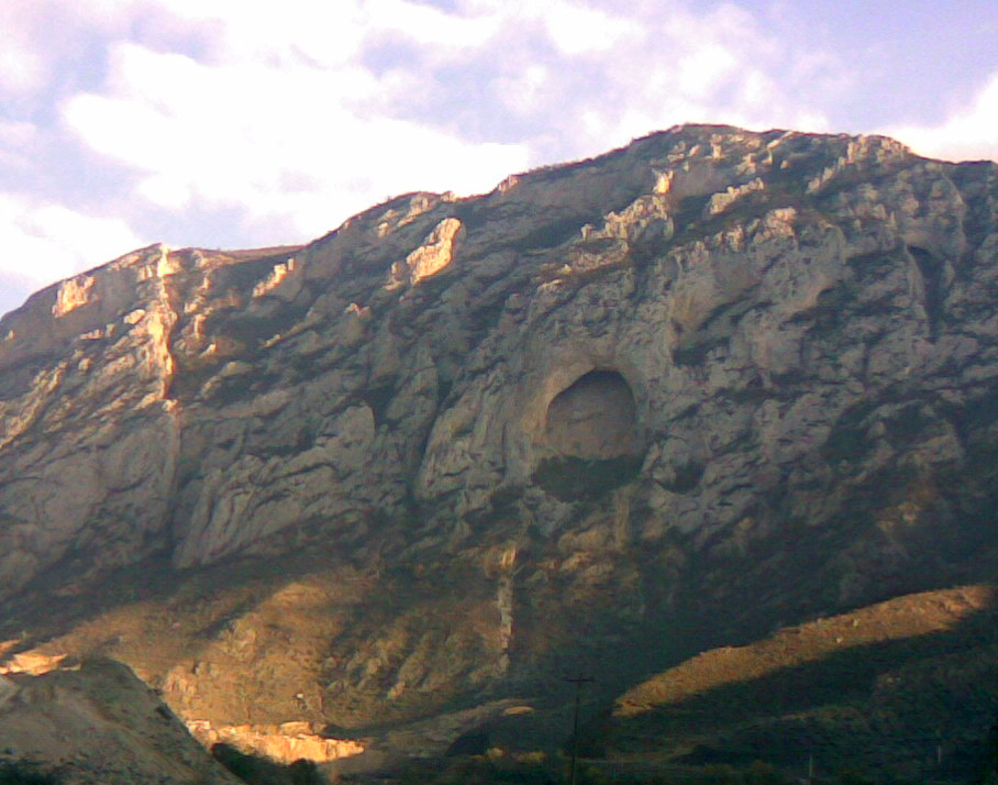 غار اسپهبدخورشید